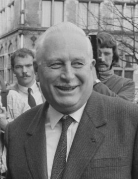 Los ministros de defensa Win va Eekeleen y André Giraud.